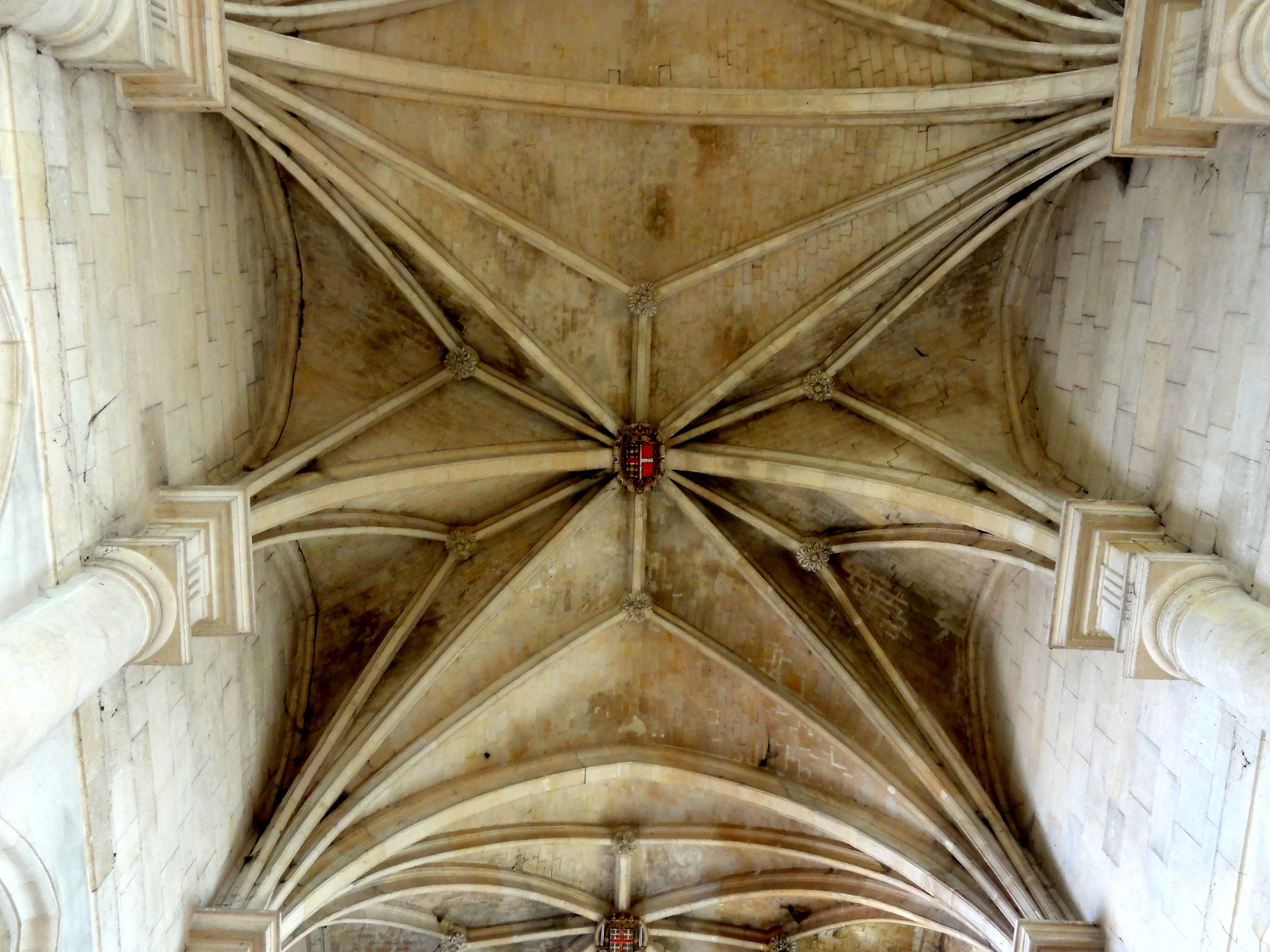 Voûtes de la quatrième et cinquième travée de la nef.